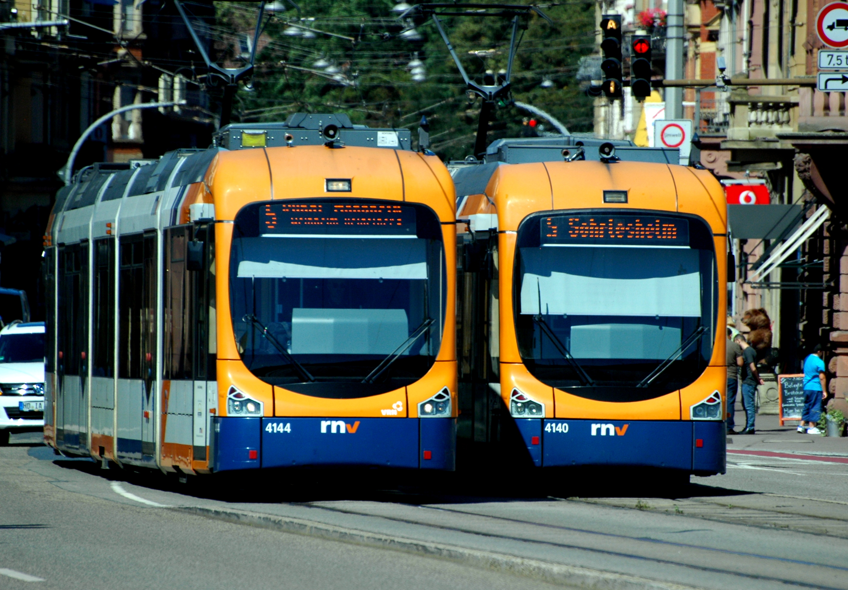 Trams in Heidelberg